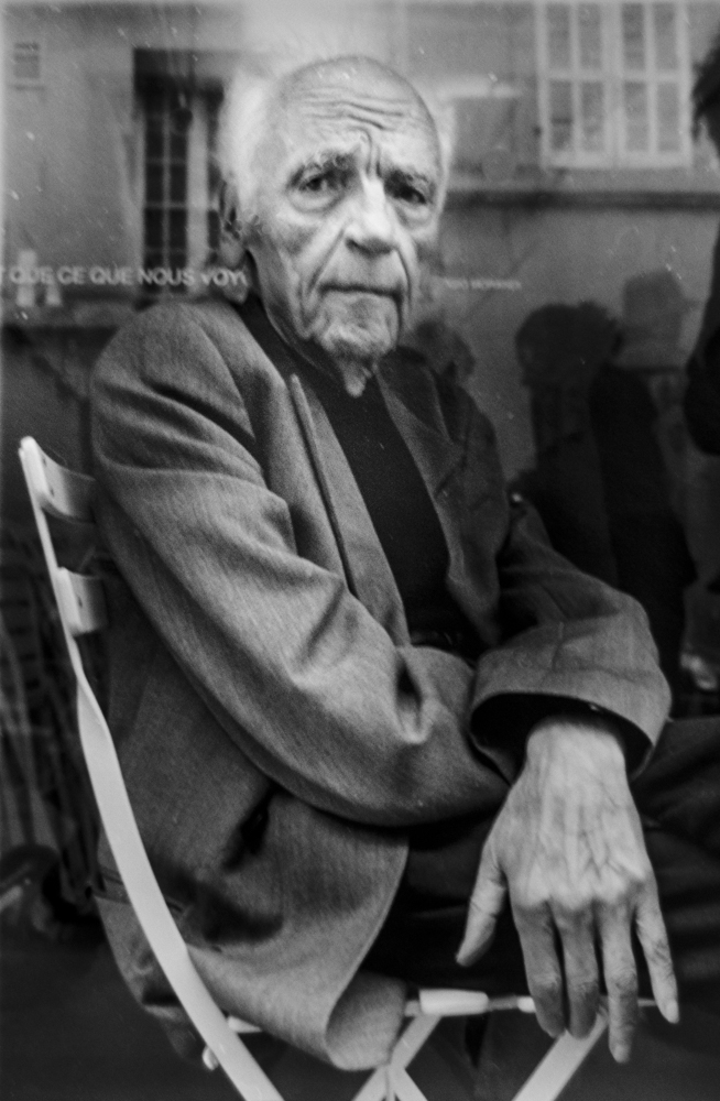 Alain Jouffroy /Aix en provence / après une lecture Galerie la Non-Maison Avril 2010.